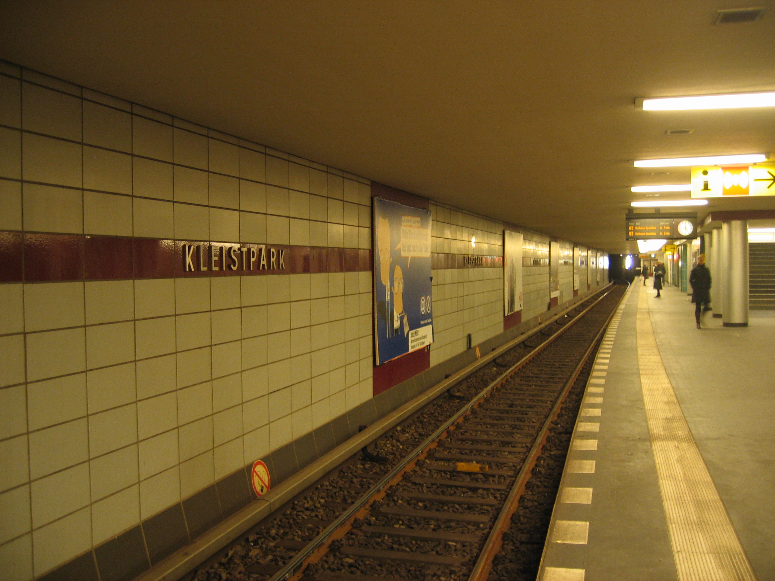 U-Bahnhof Kleistpark in Berlin